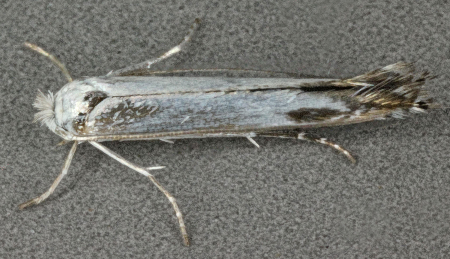 Lyonetia clerkella, Dolydd Hafren, Wales, Aug 2014 2